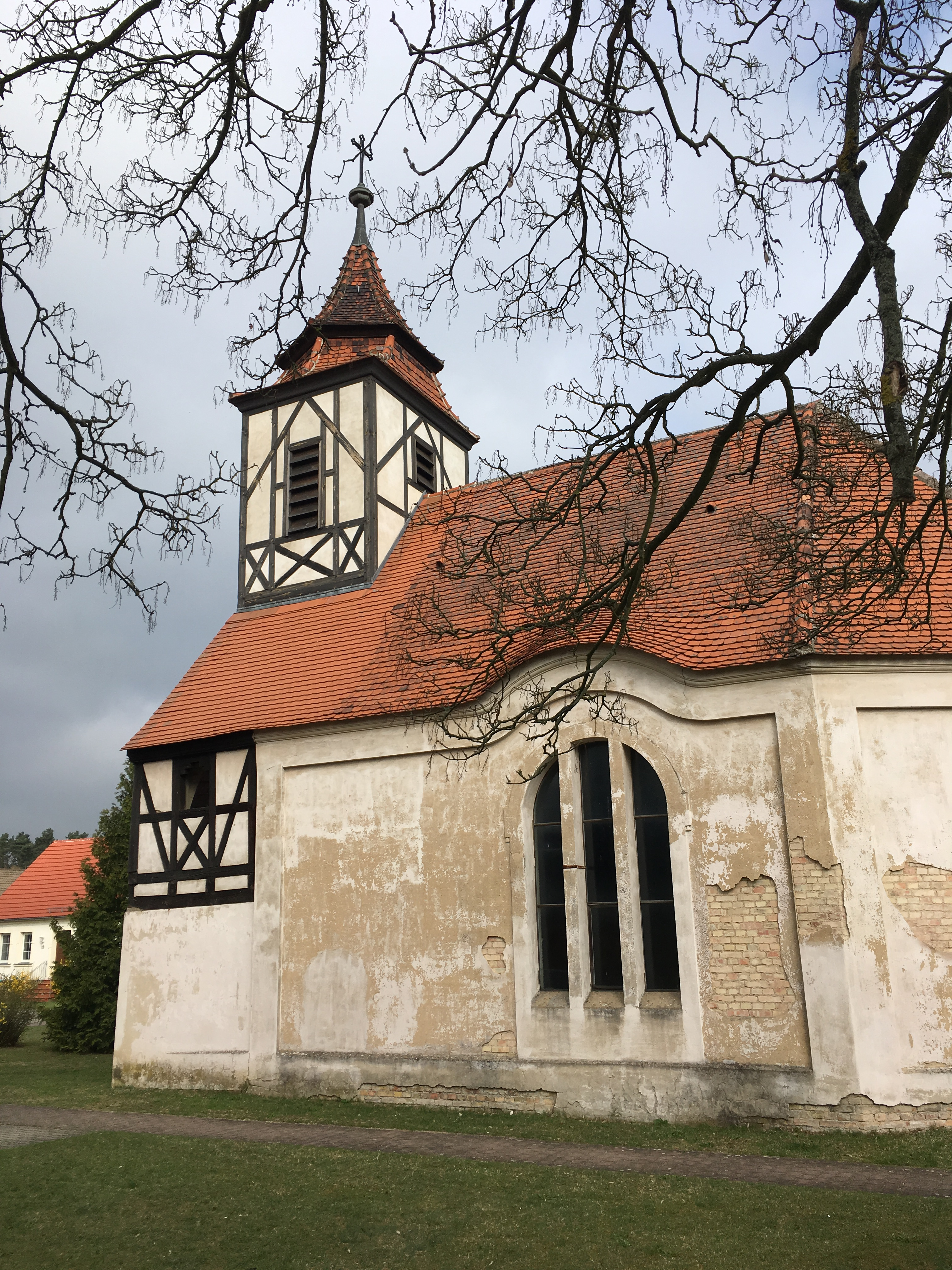 Die Dorfkirche in Klausdorf ist eine neubarocke Saalkirche in Klausdorf, ein Gemeindeteil des Ortsteils Bardenitz der Stadt Treuenbriezen. Die schlichte Ausstattung stammt aus der Bauzeit der Kirche.